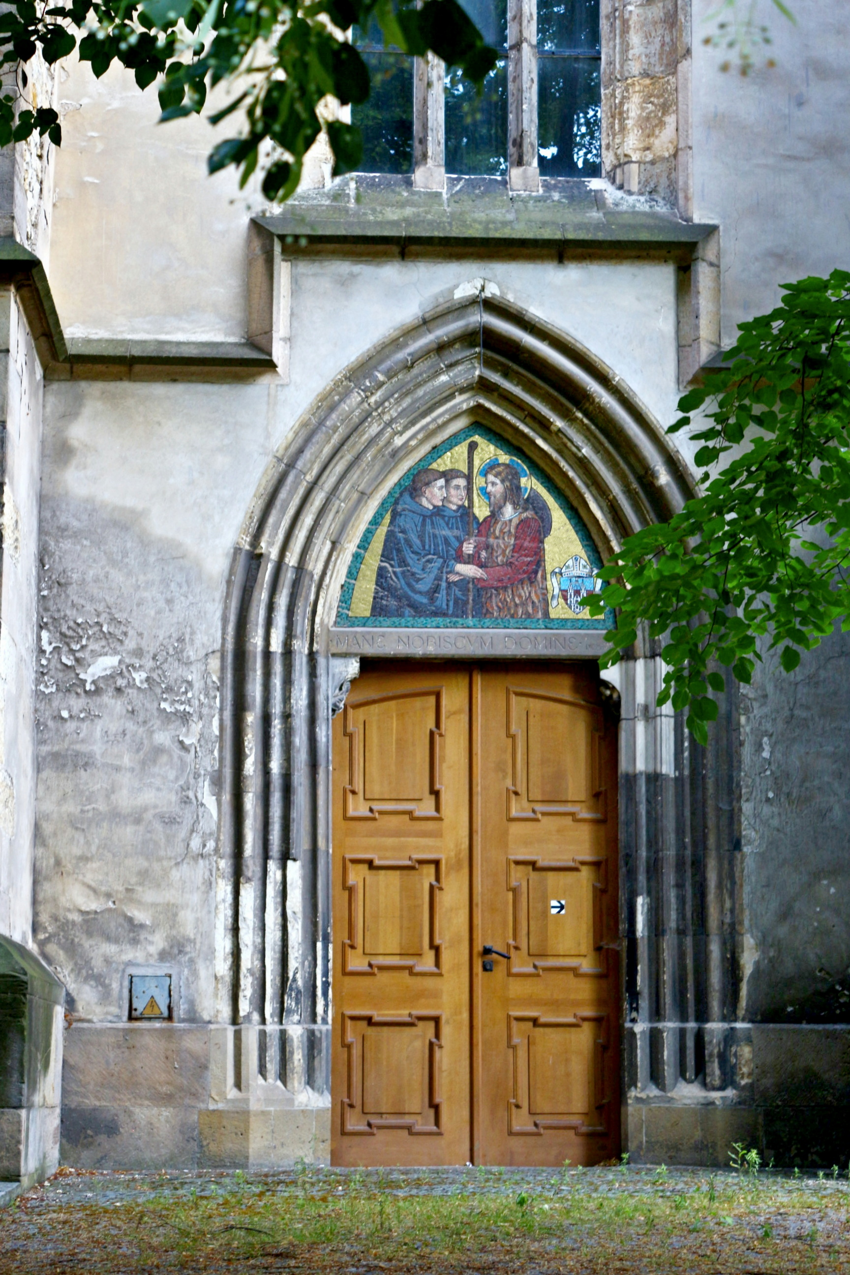 Kostel Panny Marie na Slovanech